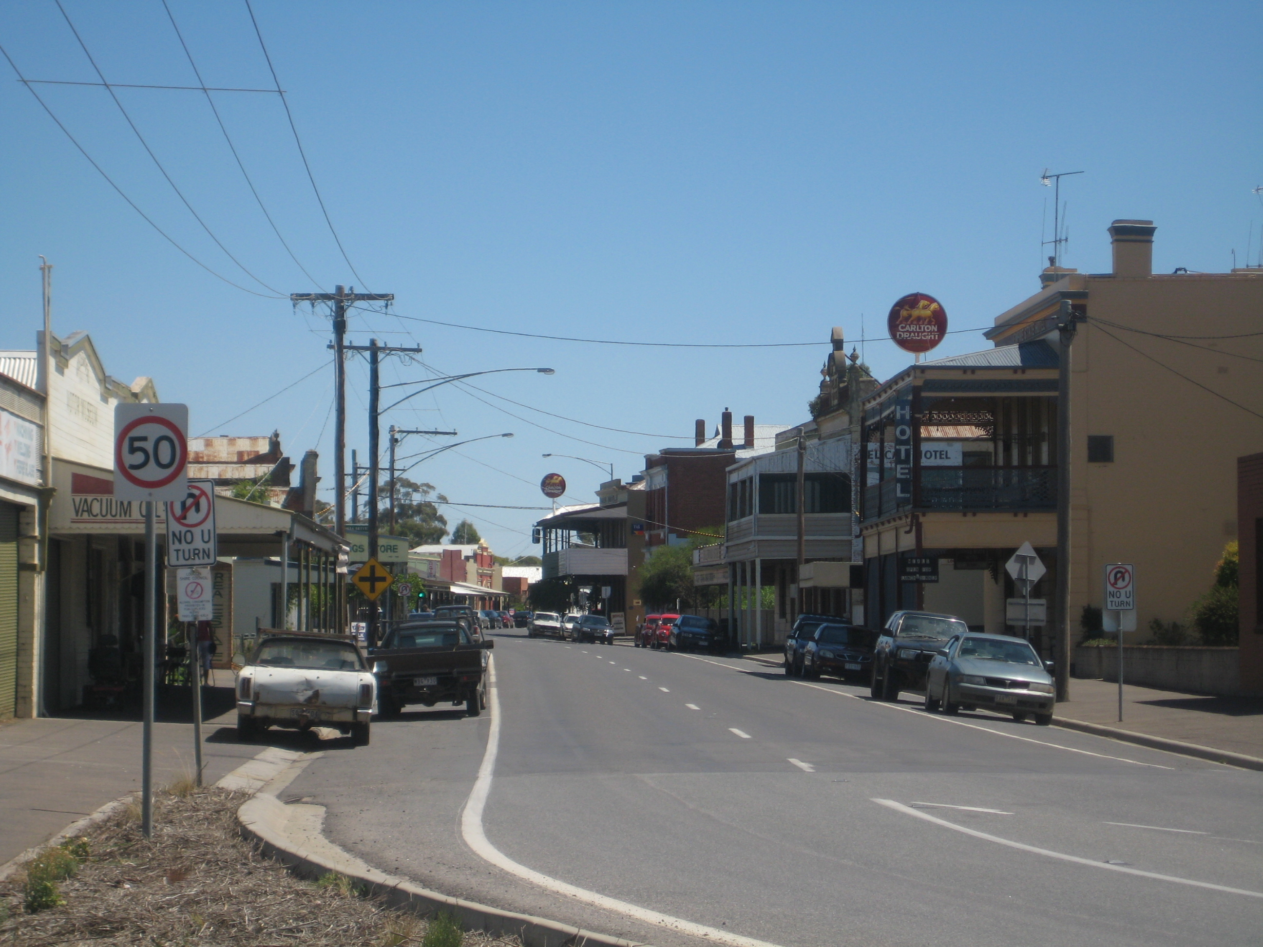 Brooke St Inglewood